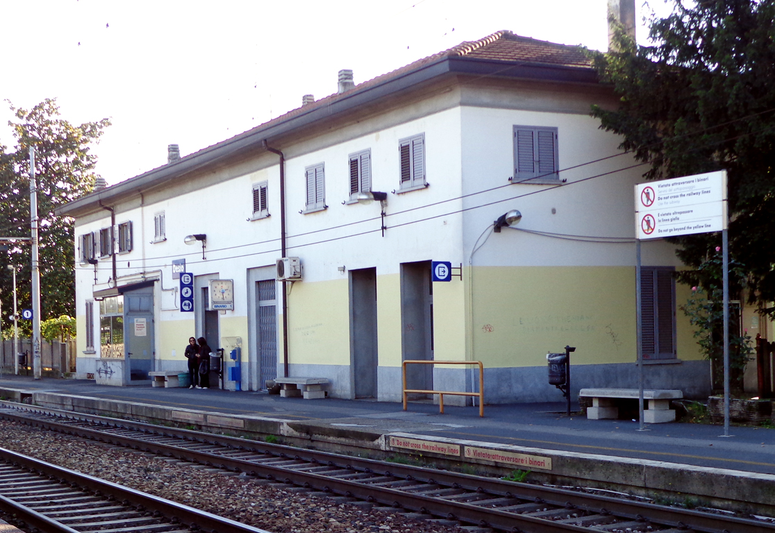 Stazione ferroviaria di Desio, il fabbricato viaggiatori visto dal lato binari.